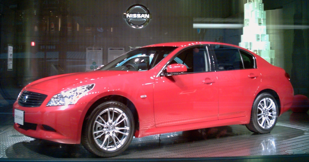 NissanSKYLINE VQ35HR Nissan GALLERY.Ginza_Japan